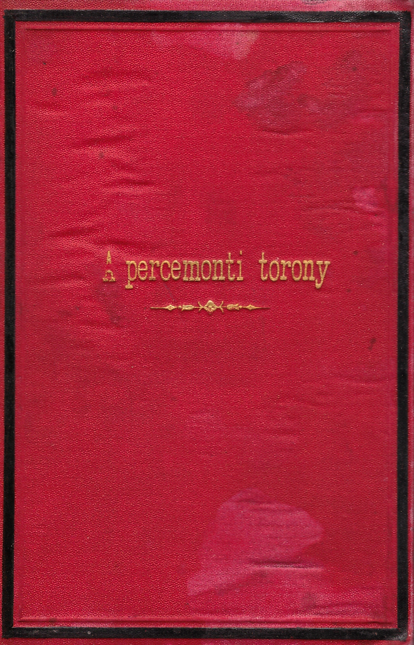 George Sand (1804-1876): A percemonti torony (1885-ös kiadás, saját készítésű kép)